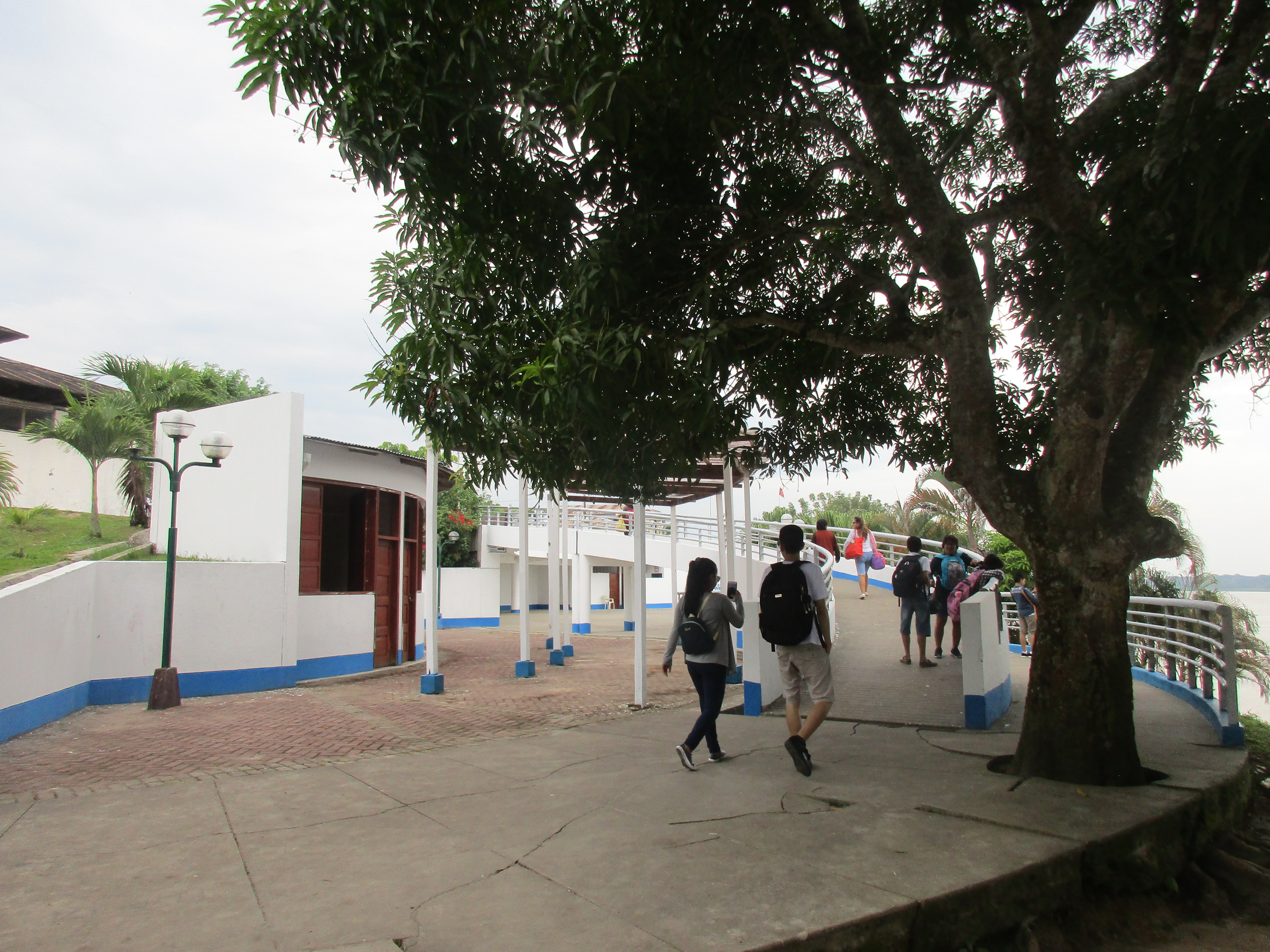 Bulevar de Tamshiyacu